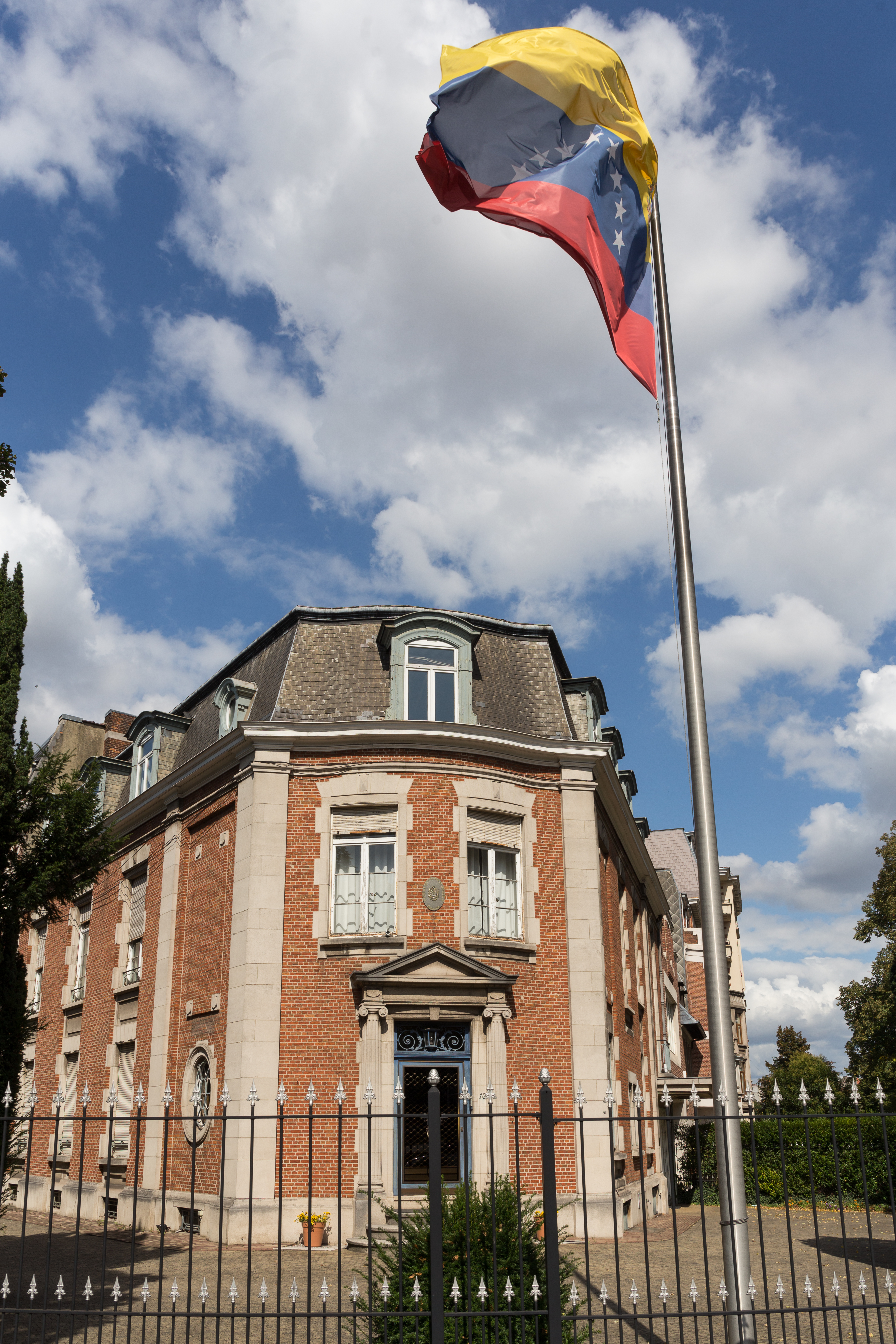 Ambassade du Venezuela en Belgique, avenue Franklin Roosevelt 10 à Bruxelles.